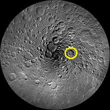 南森环形山的位置